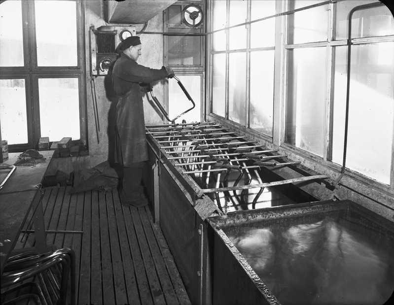 Produksjon av busseter, Romo fabrikker 1949.